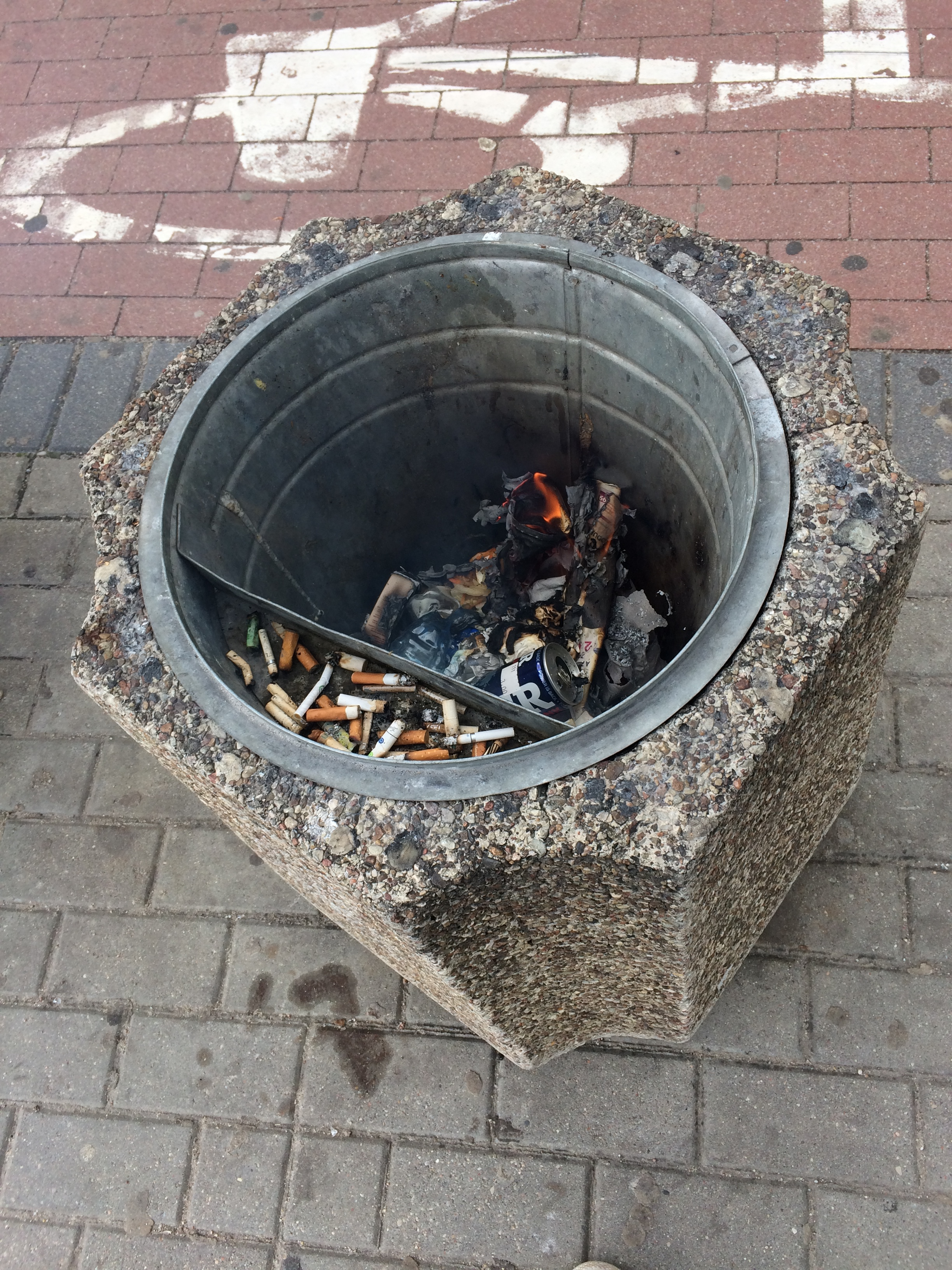 Zaprószenie ognia na przykładzie palących się śmieci w koszu